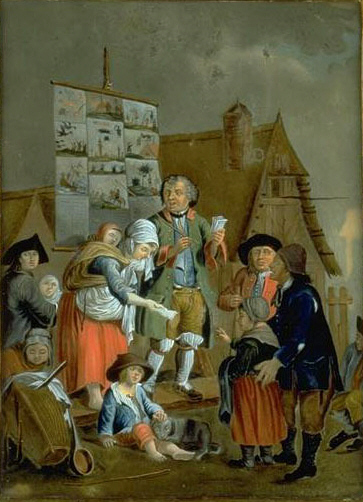 Bänkelsänger mit Frau und ländlichem Publikum. Beromünster. Eglomisé auf Glas. 25.5 cm x 19 cm Schweizerisches Landesmuseum, Zürich